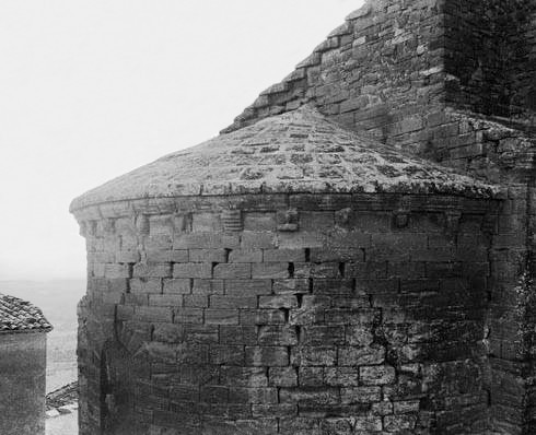 Absis de Santa Maria del Castell de Cubells. Rafael Degollada i Castanys (Entre 1912 i 1924)